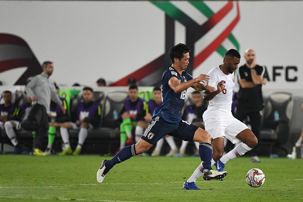 دیدار فینال جام ملت‌های 2019 آسیا بین تیم ملی فوتبال قطر و ژاپن بعدظهر جمعه 12 بهمن در ورزشگاه زاید به قضاوت روشن ایرماتوف ازبکستانی برگزار شد.المعزعلی در دقیقه 12 و عبدالعزیر حاتم 27 و اکرم عفیف در دقیقه 83 با ضربه پنالتی برای قطر گلزنی کردند.برای ژاپن مینامینو 69 موفق به گشودن دروازه قطر شدند.